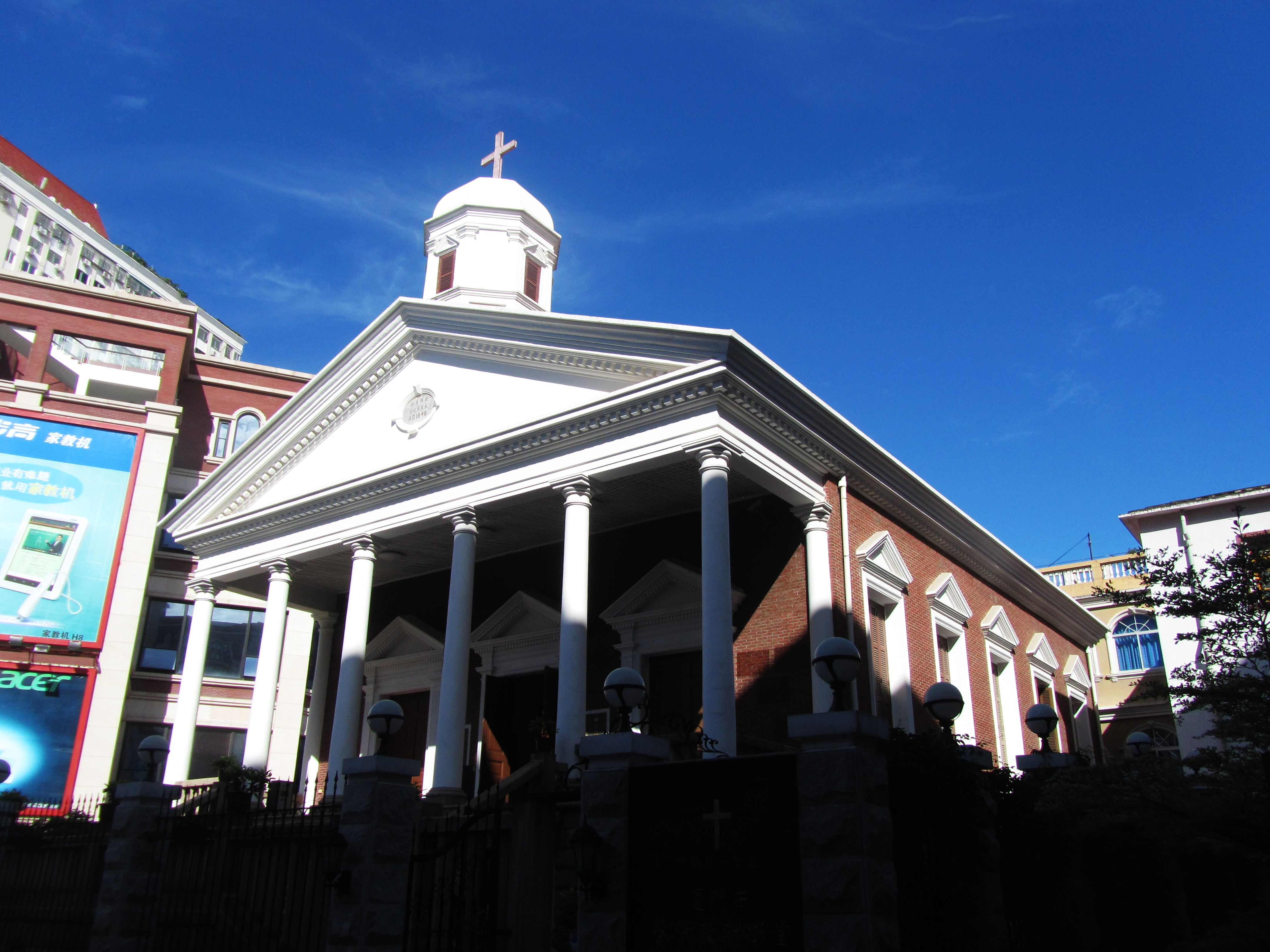 厦门新街礼拜堂，西北面。